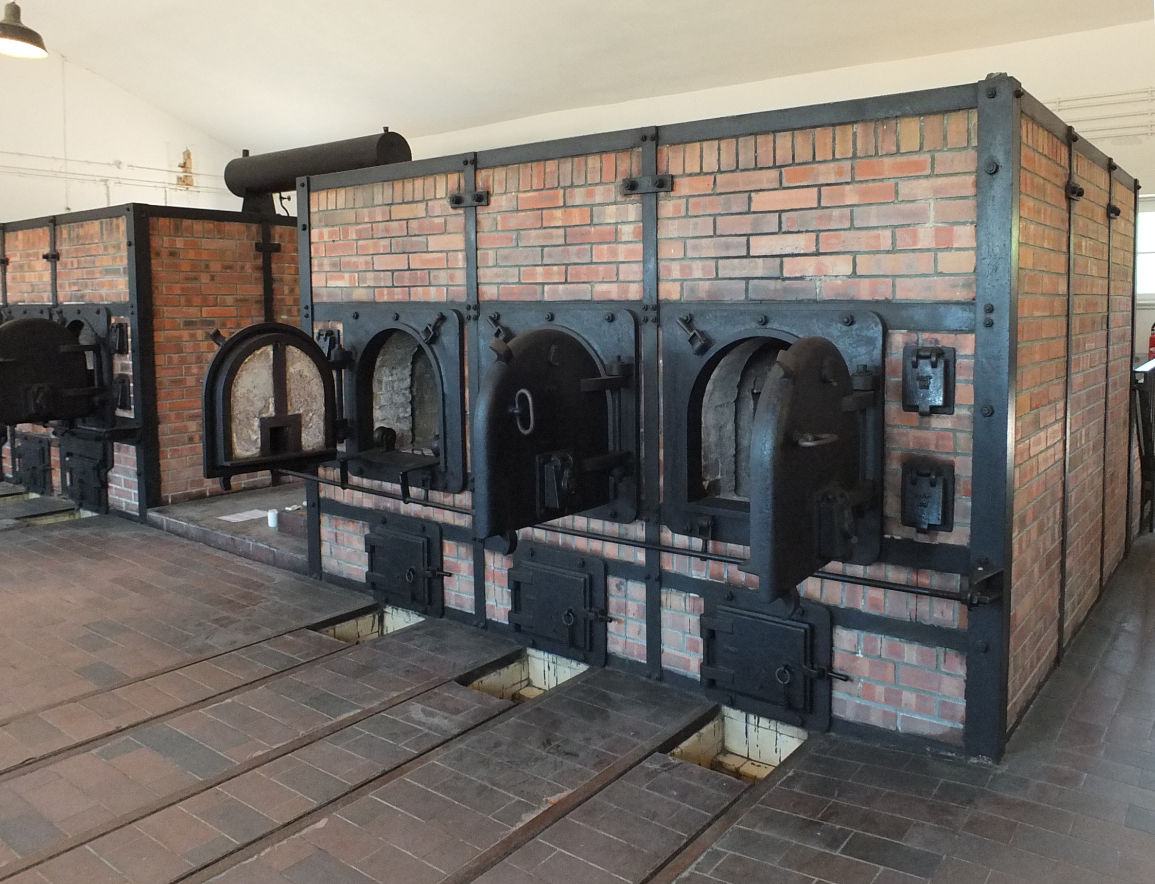 Crematorium van KZ Buchenwald met verbrandingsovens van de firma J. A. Topf & Söhne.